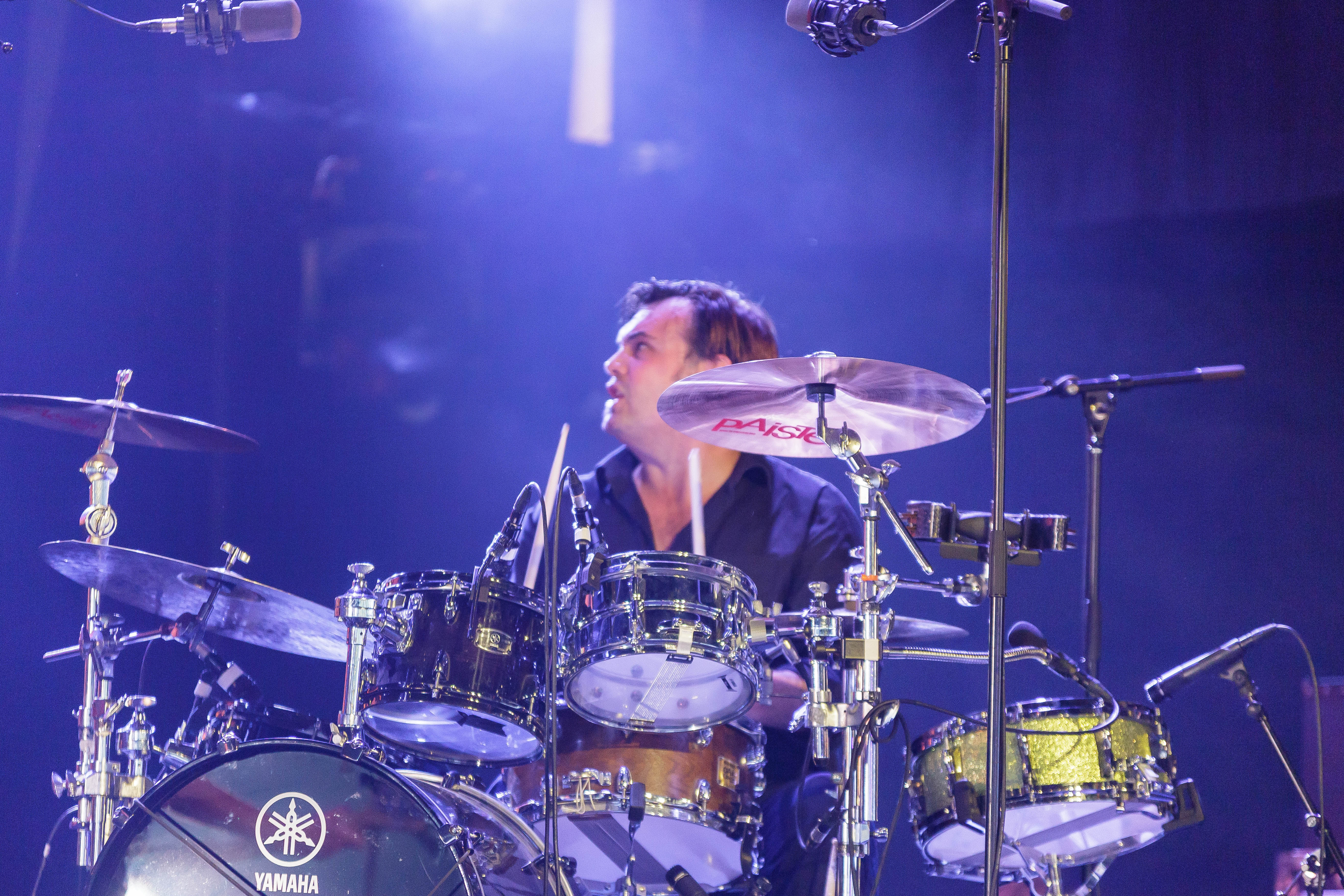 Paléo Festival Nyon, édition 2016, 19-24 juillet 2016. Vendredi 22: The Celtic Social Club (folk celtique, France/Écosse)